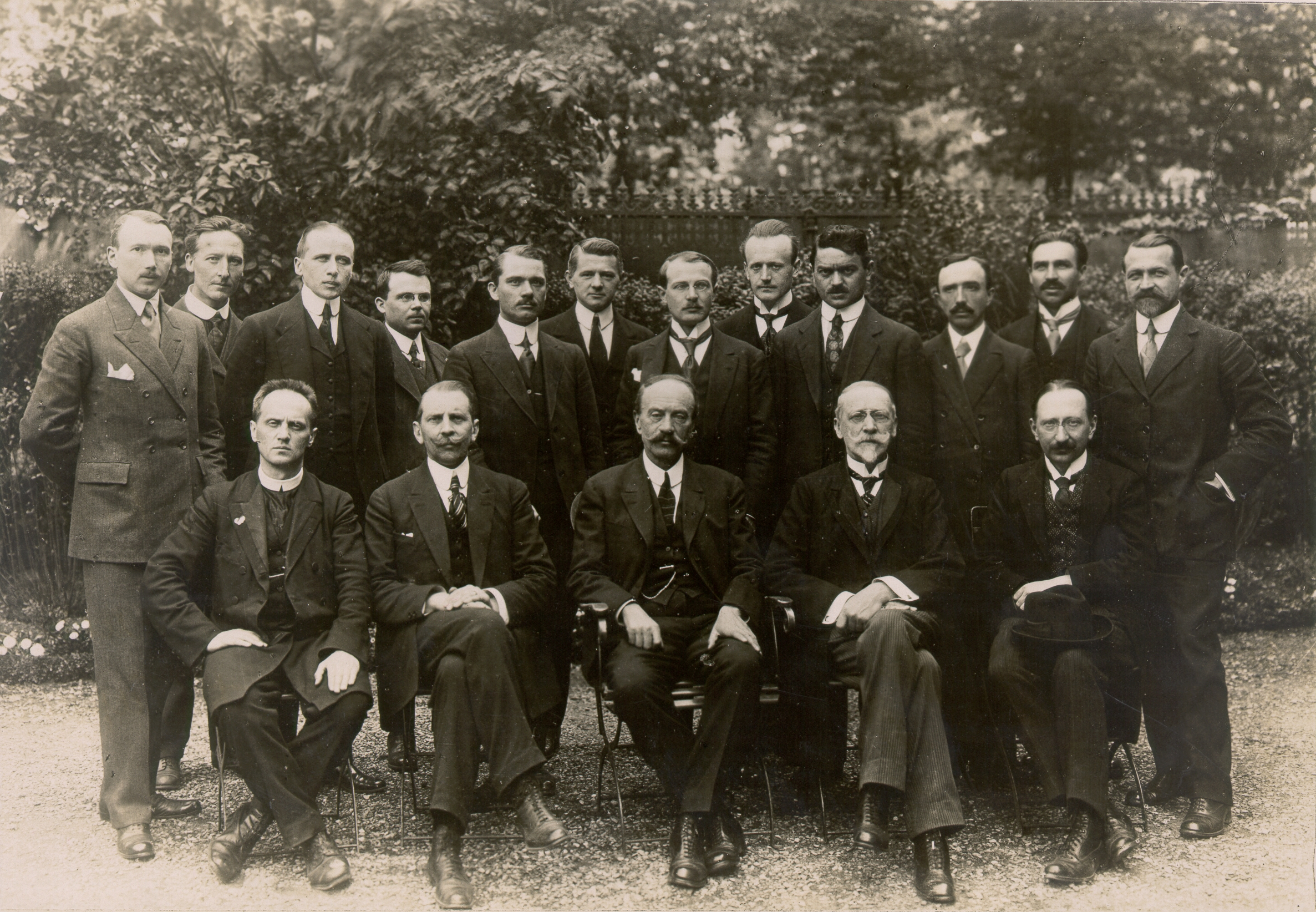 Slovenska sekcija pri jugoslovanski delegaciji na pariški mirovni konferenci